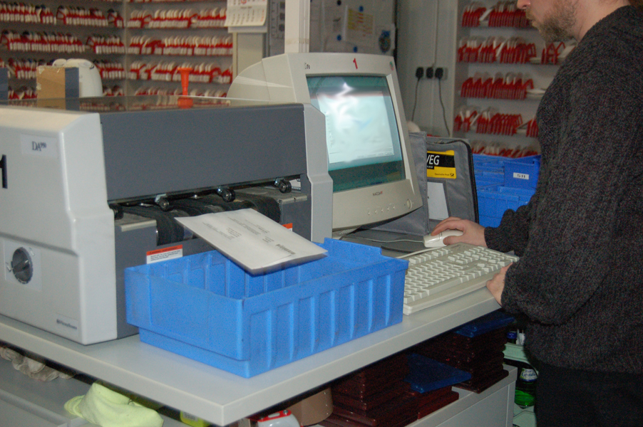 Drucken neuer Umschläge beim DVD-Verleih